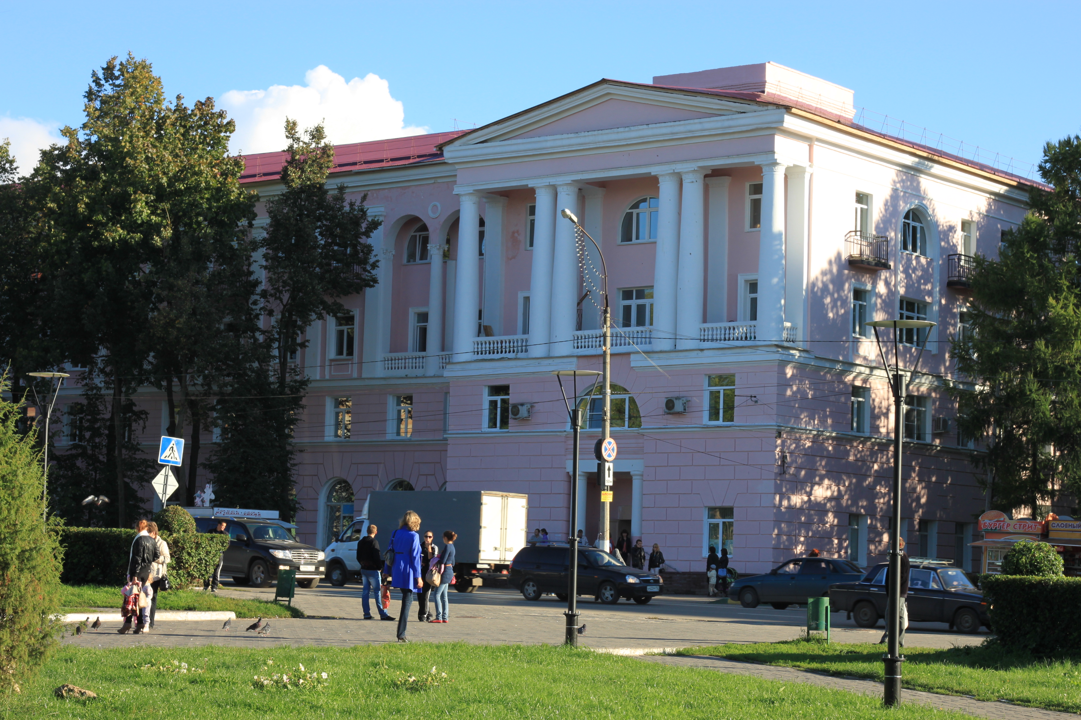 Krankenhaus